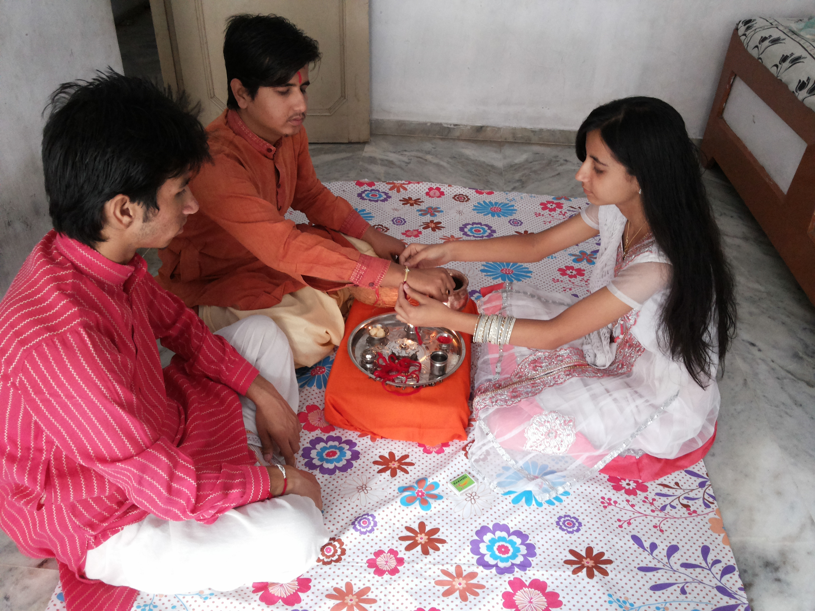 संस्कृतम्: रक्षाबन्धनम्1